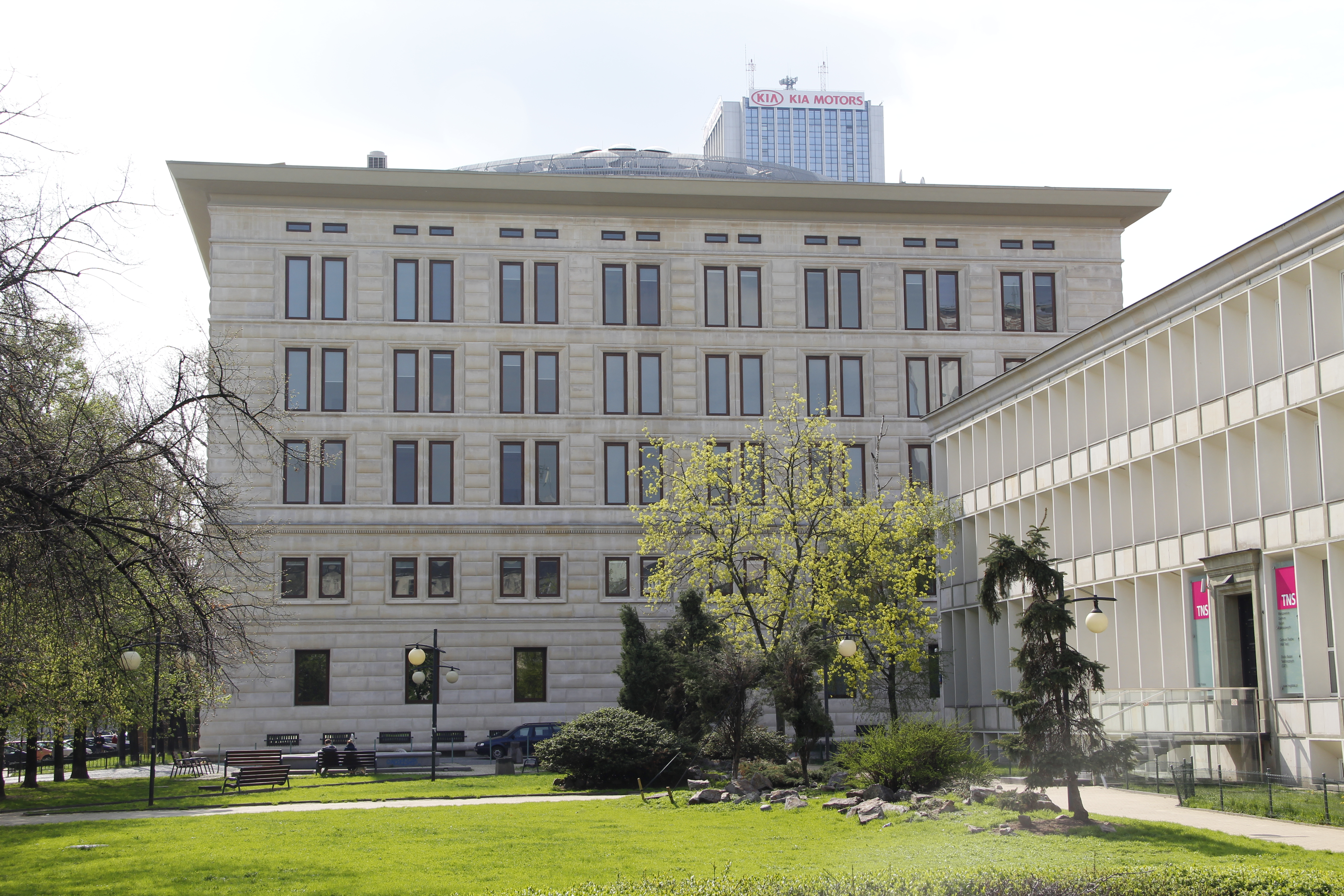 Biurowiec Ufficio Primo, Warsaw